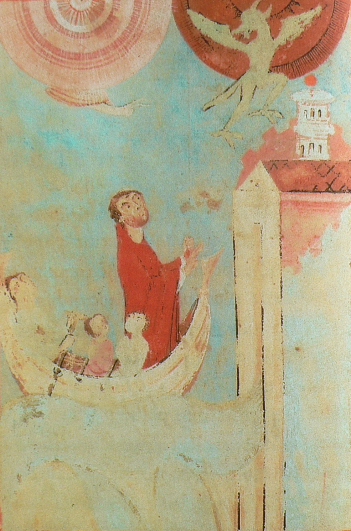 Eigenes Foto nach einer Vorlage aus dem 11. Jahrhundert; gemeinfrei, da Schutzfrist abgelaufen.